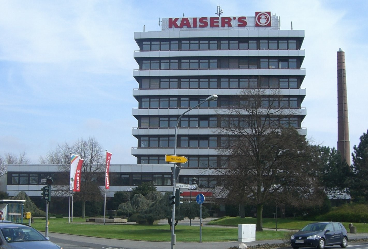 Firmensitz von Kaiser's Tengelmann in Viersen.